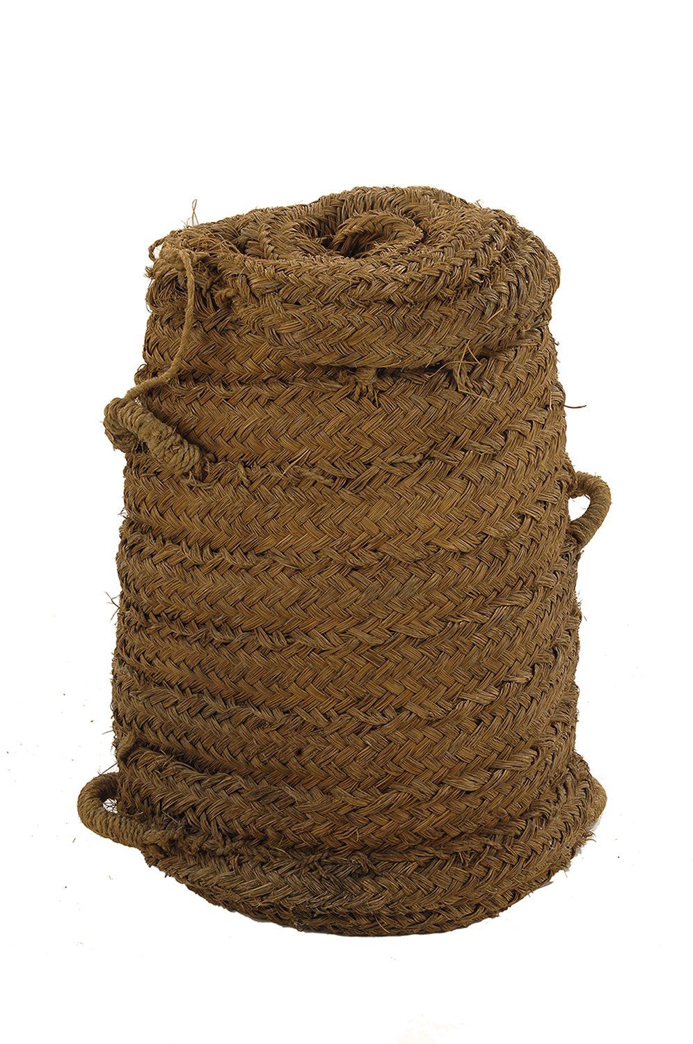 Fotografies dels objectes de l'exposició permanent de la sala "Secà i Muntanya" del Museu Valencià d'Etnologia - Fotografies de Mateo Gamon. "Talzim" d'espart. Per a transportar olives.